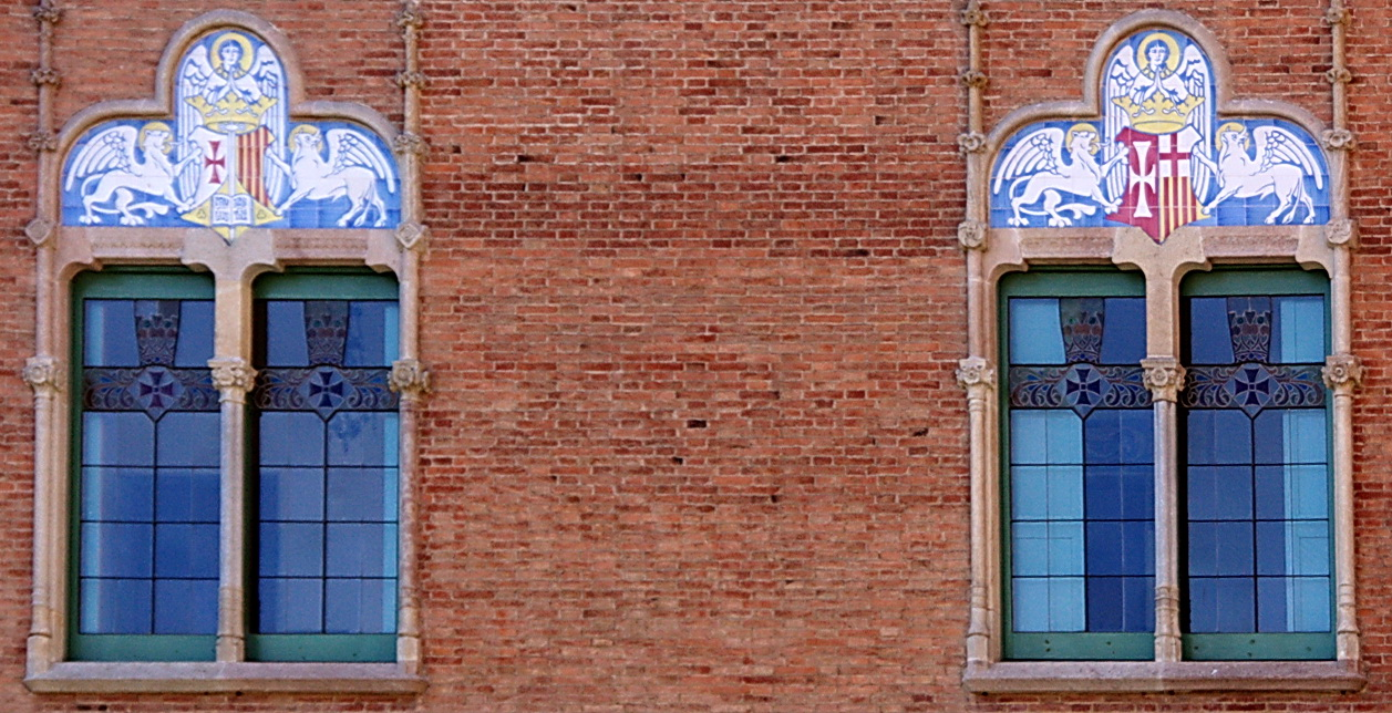 Finestres amb timpà ceràmic d'un pavelló de l'hospital de Sant Pau (Barcelona, Catalunya), obra modernista de 1905. El disseny és de l'arquitecte Lluís Domènech i Montaner, La ceràmica que es mostra a la imatge era obra de la fàbrica Elies Peris i cia.